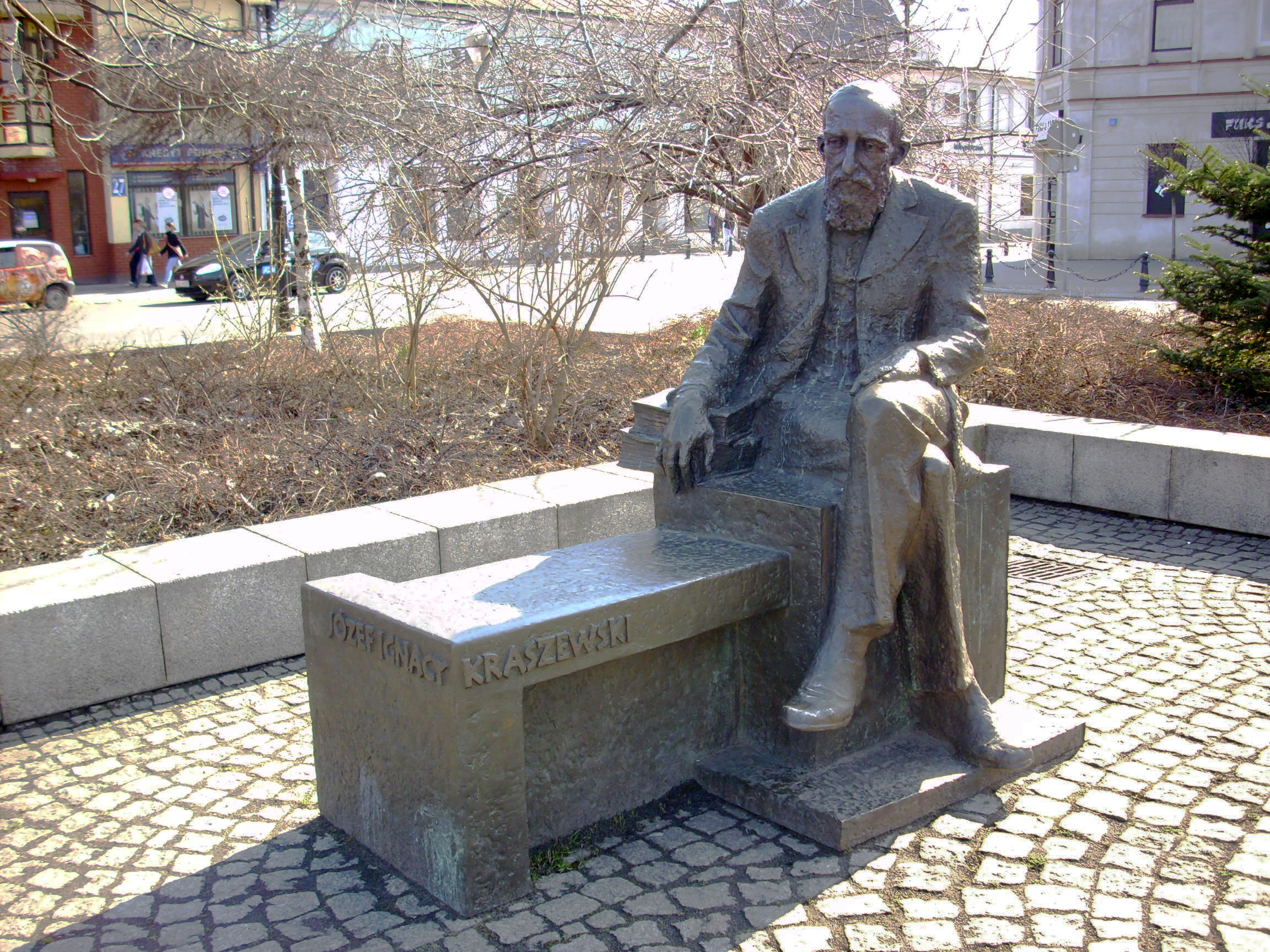 Biała Podlaska. Pomnik Józefa Ignacego Kraszewskiego.